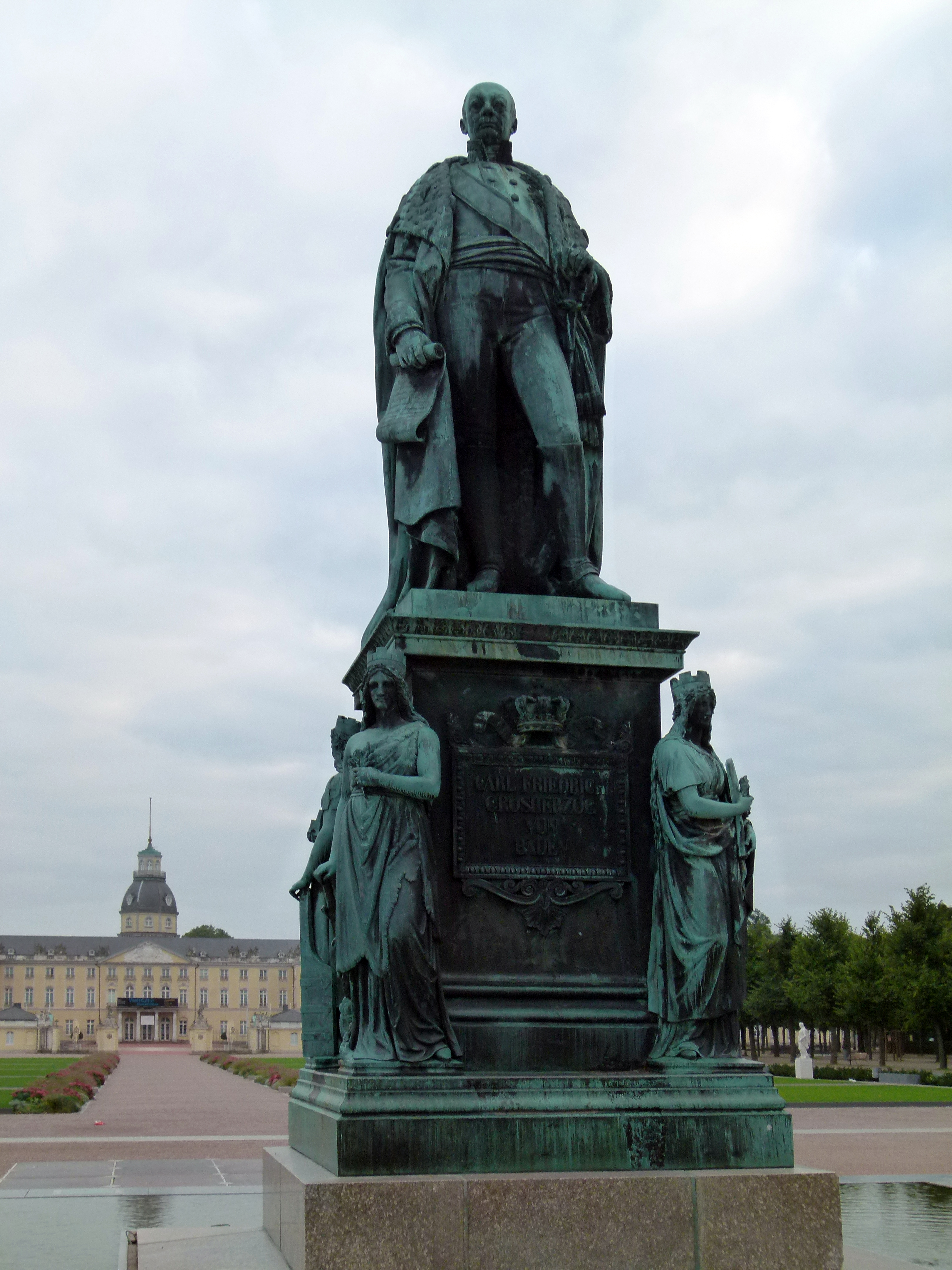 Großherzog-Karl-Friedrich-Denkmal, Schlossplatz, Karlsruhe